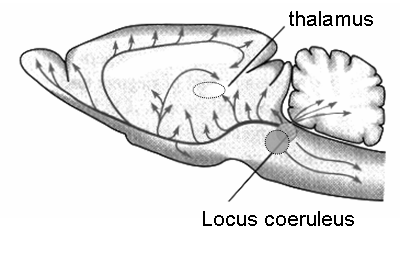 Het diffuse noradrenaline projectiesysteem van hersenstam naar cortex, in de hersenen van de rat.